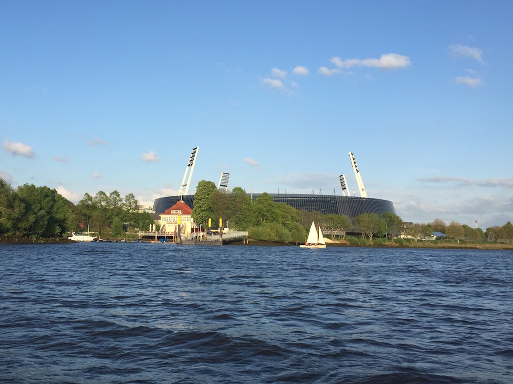 Das Weserstadion in Bremen. Im Vordergrund ist der Segelverein "Weser" mit Yachthafen